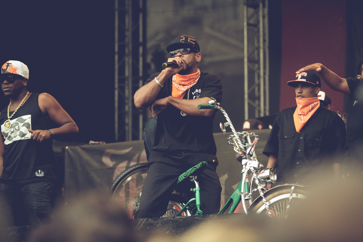 Chegando no Bang.